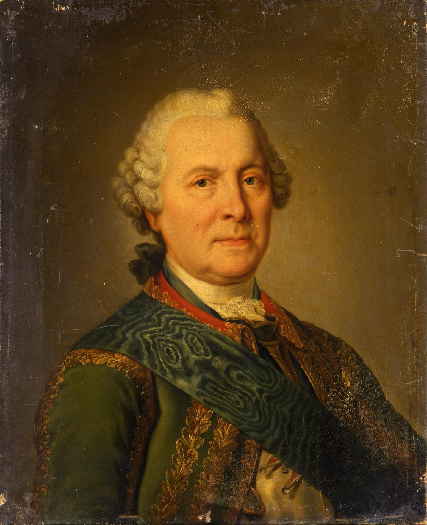 Portrait of General-Feld-Marchall Burchard Christoph Graf von Münnich.